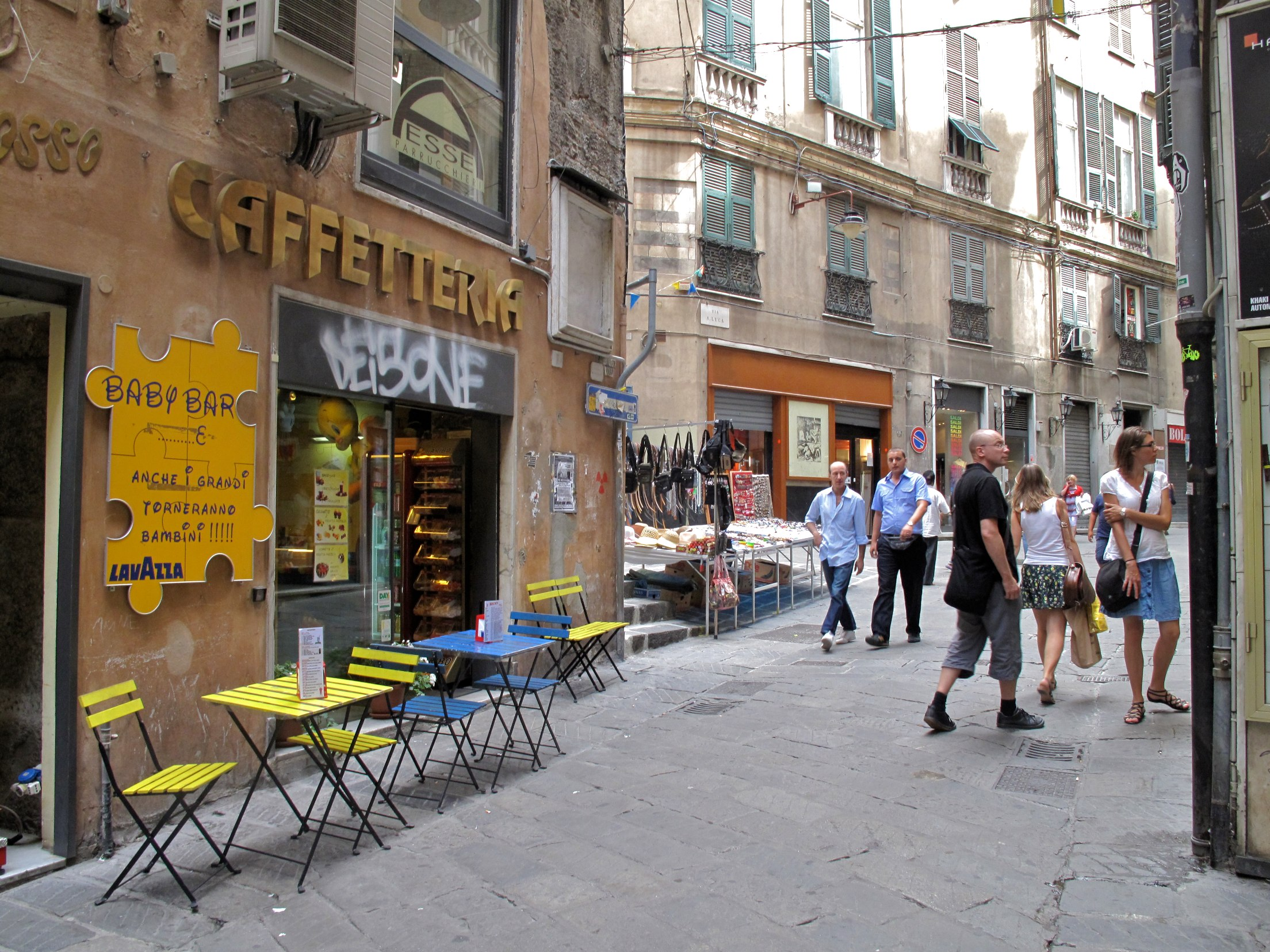 Genova, via S. Luca all'angolo con via Fossatello e via S. Siro